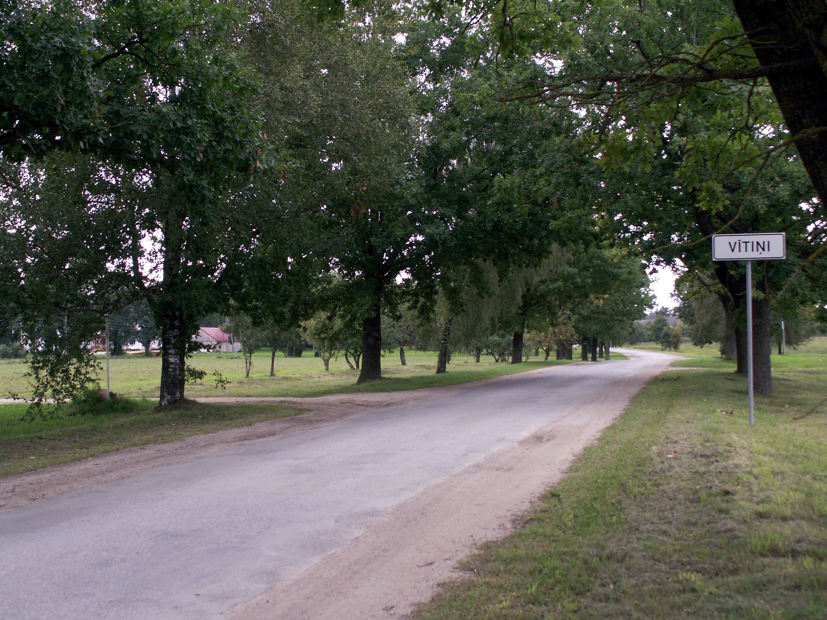 Vytiniai, Vytinių pagastas, Latvija